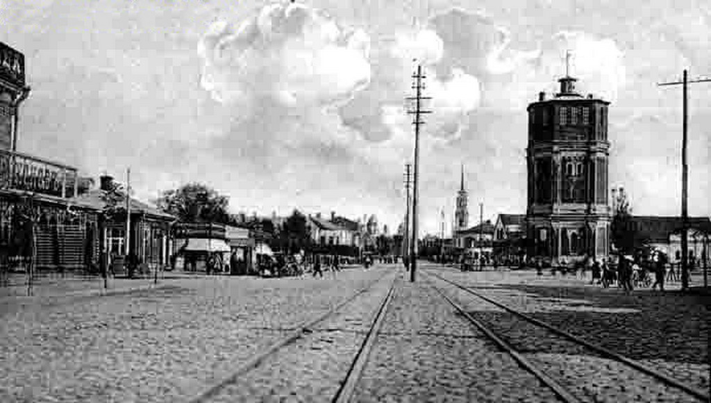 Конка в Воронеже около 1900 года